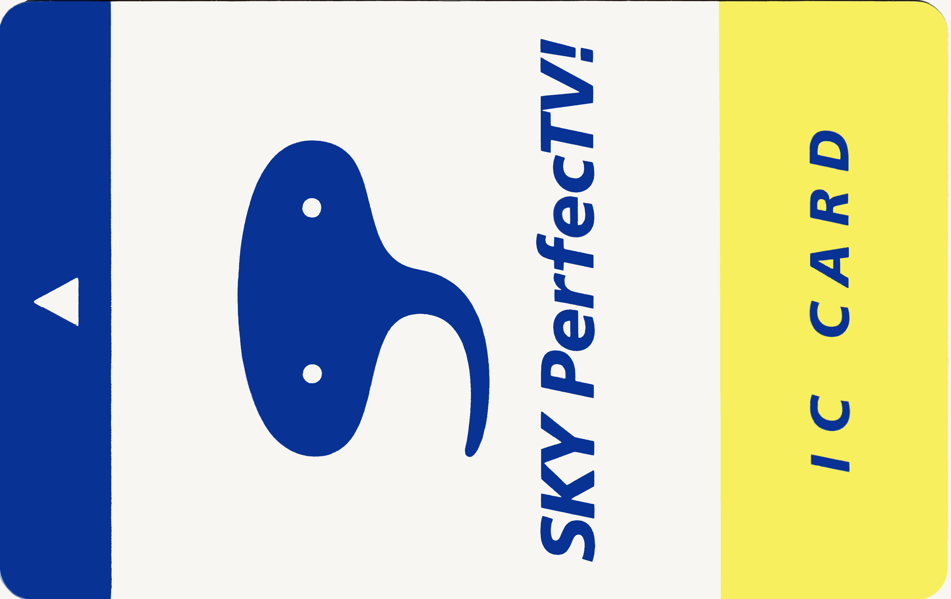 自宅にてキャナーで取り込み